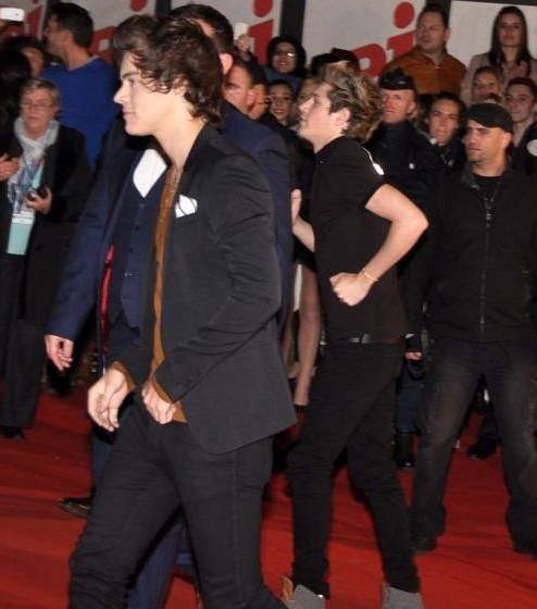 Le groupe One Direction aux NRJ Music Awards